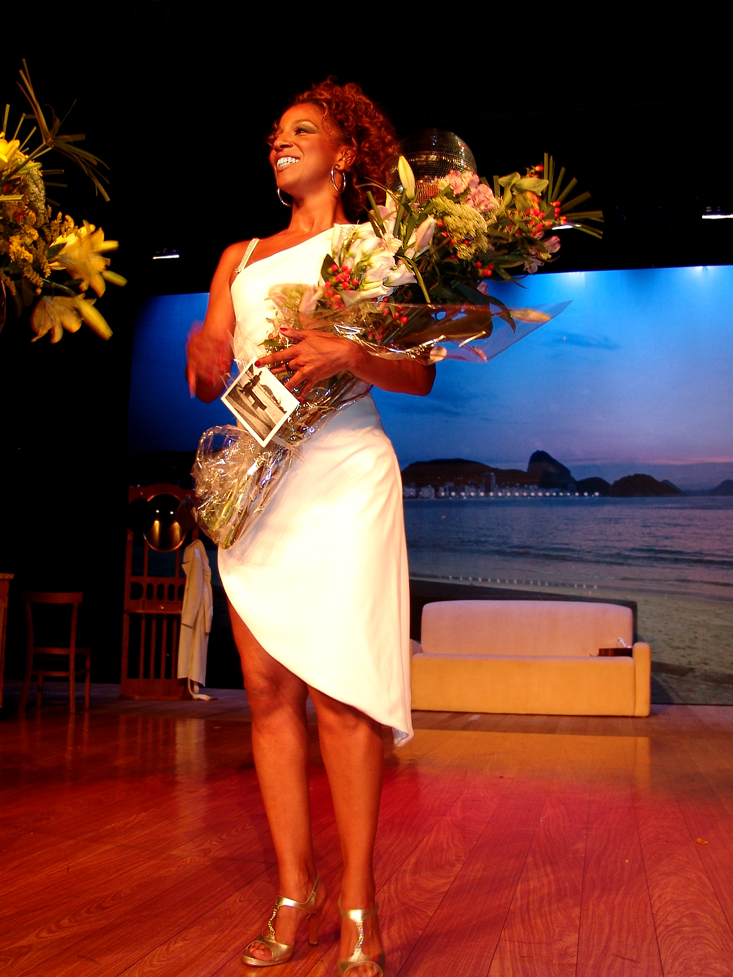 Adriana Lessa